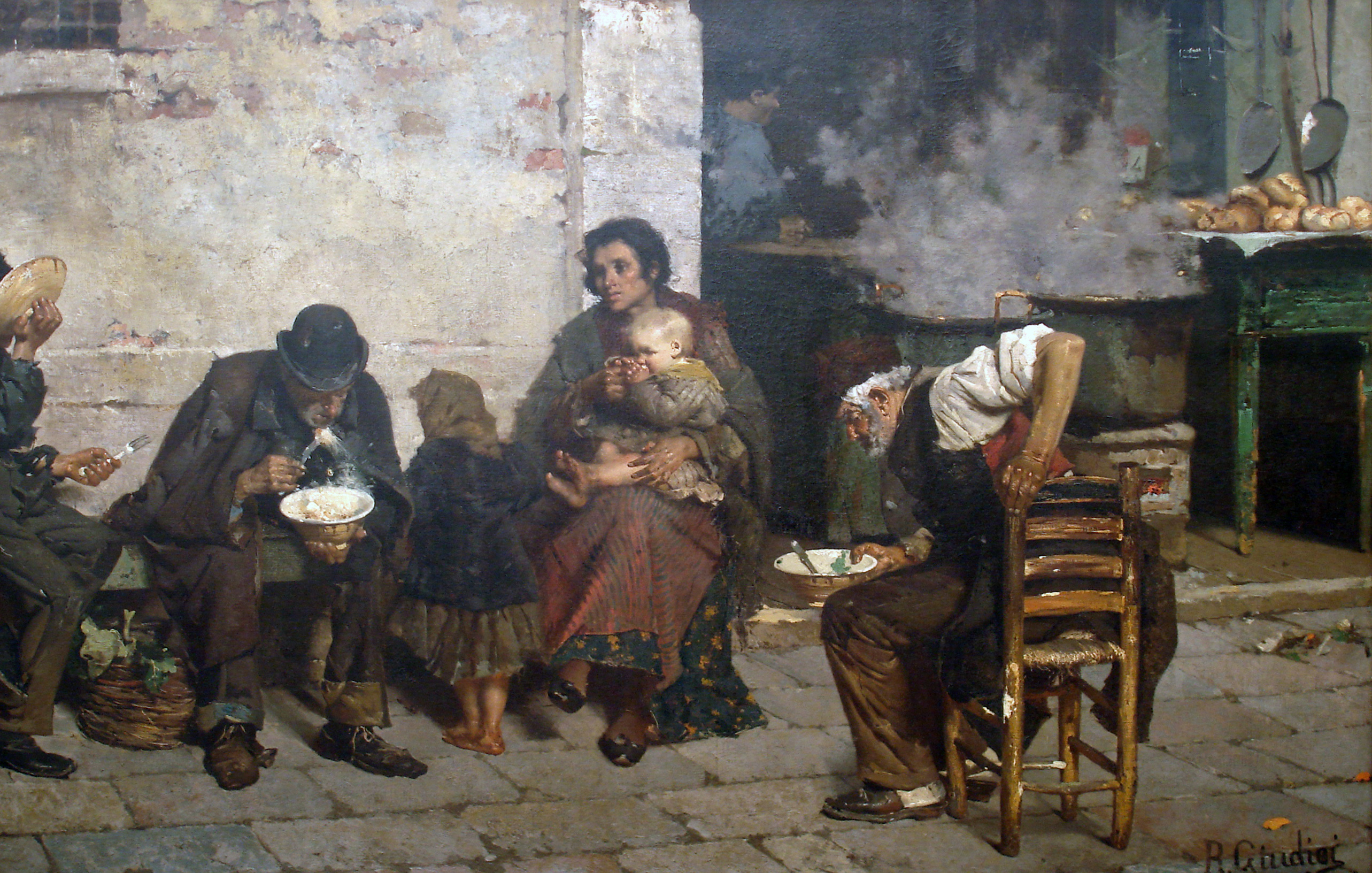 La sopa de los pobres (Venecia).